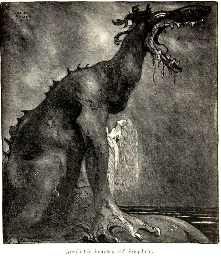 for Our Fathers' Godsaga by Viktor Rydberg